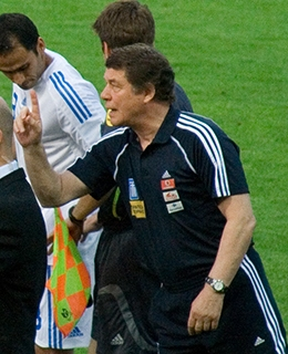 Trainer Otto Rehhagel (rechts im Bild) gibt vor der Einwechslung letzte Anweisungen